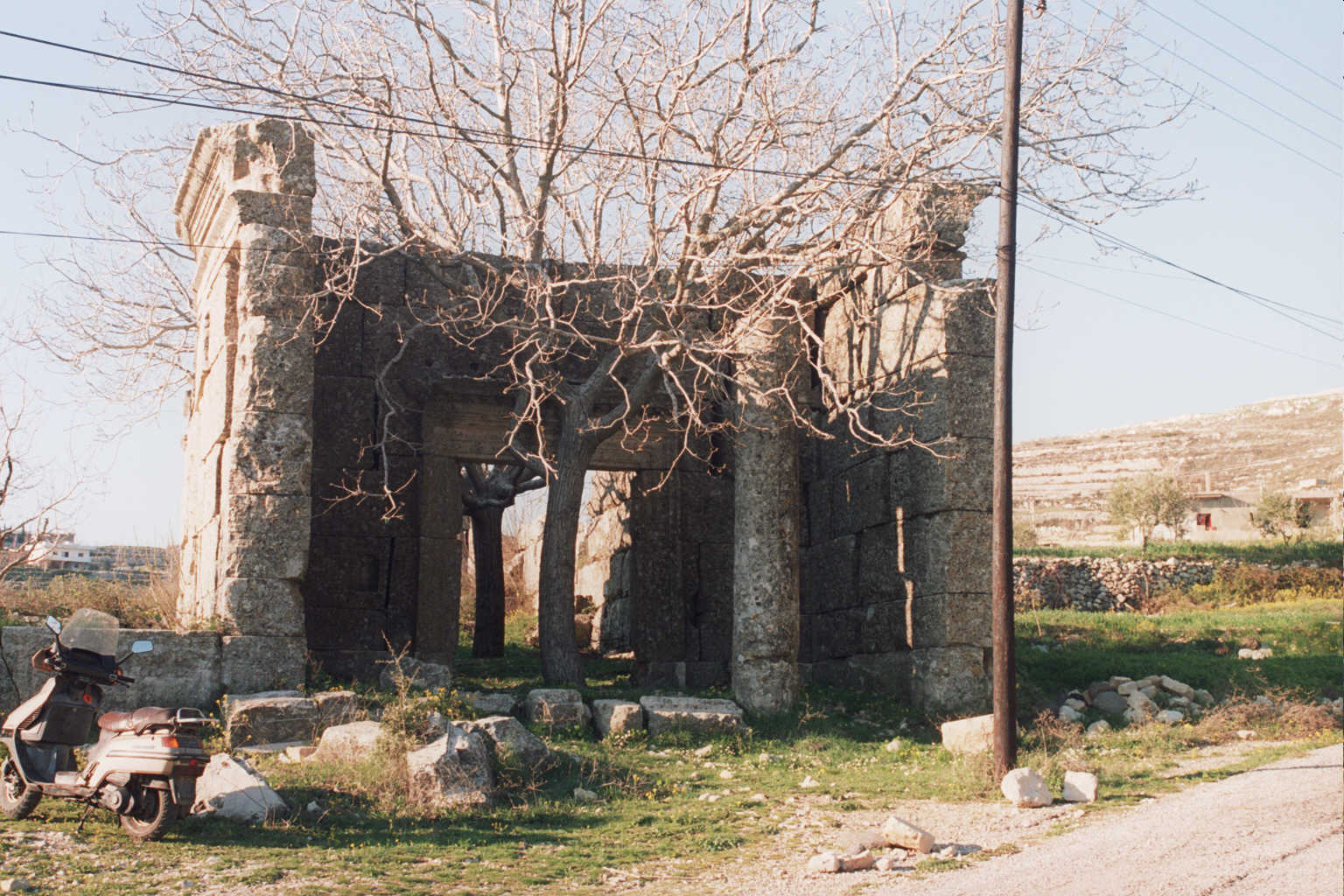 Hosn Suleiman - Siria Tempio di Astarte